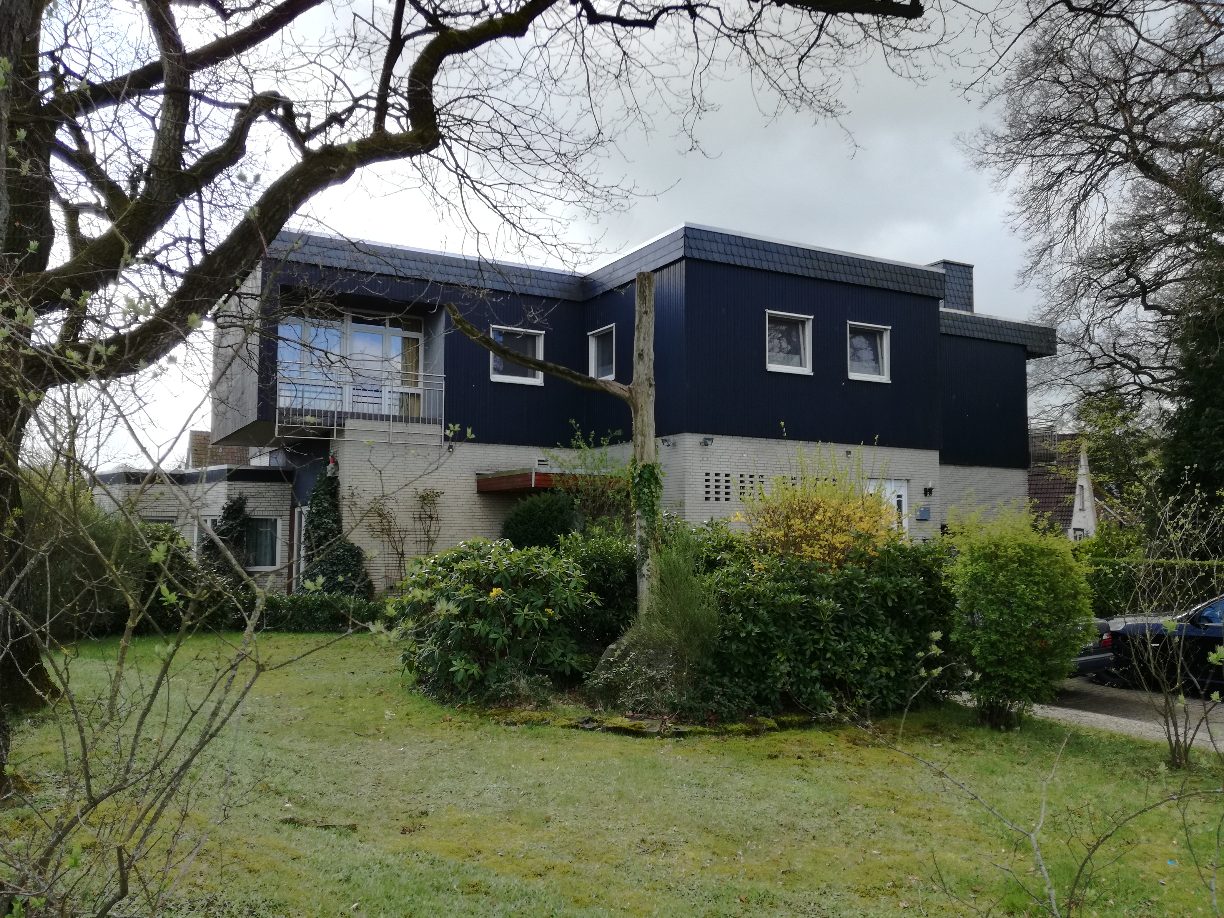 Der Wolfsgalgen am Klosterweg im Stadtteil Oestringfelde in der Stadt Schortens